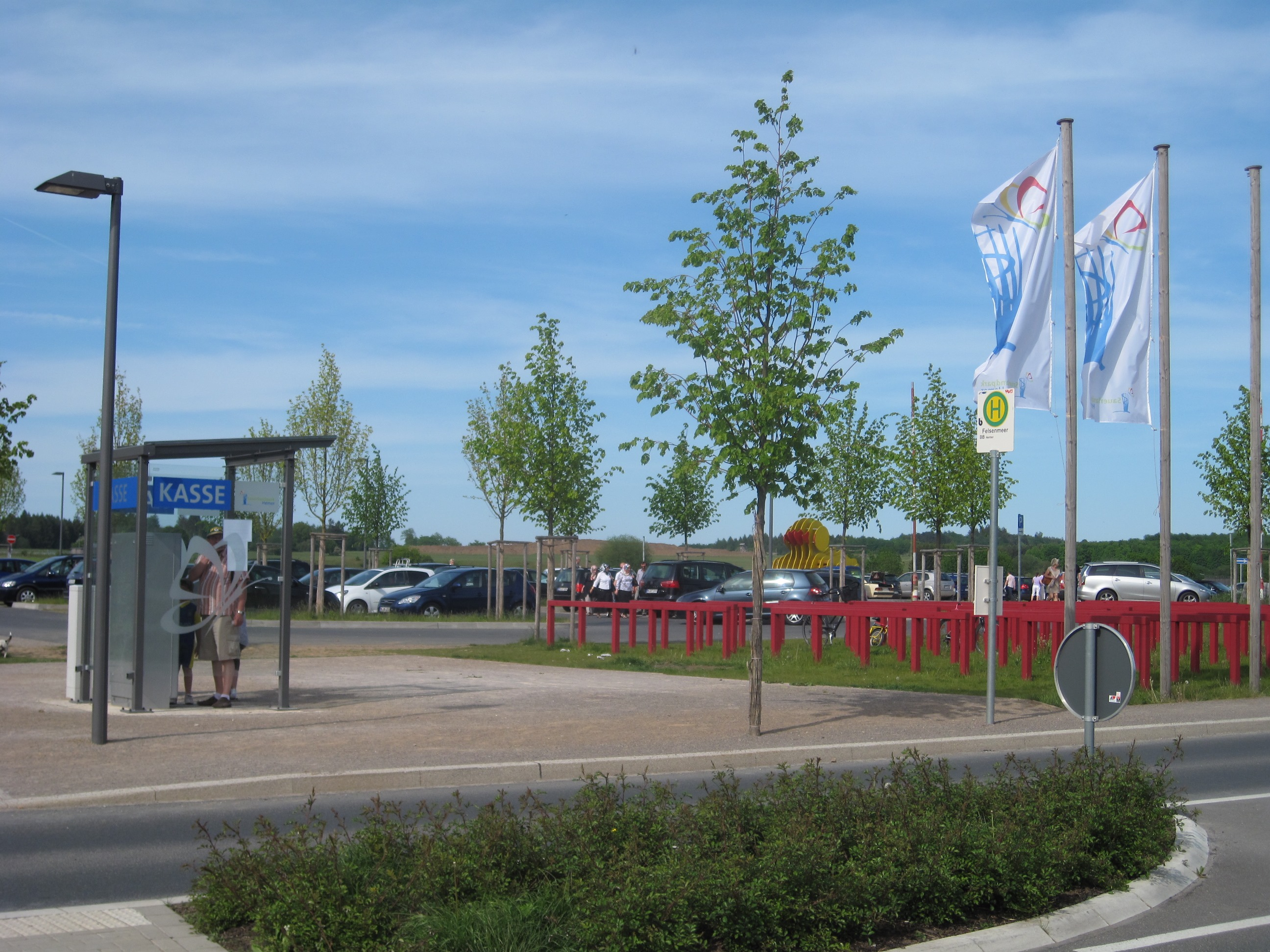 Sauerlandpark in Hemer. Kassenautomat am oberen Eingang Deilinghofer Straße (Parkplatz Deilinghofen).